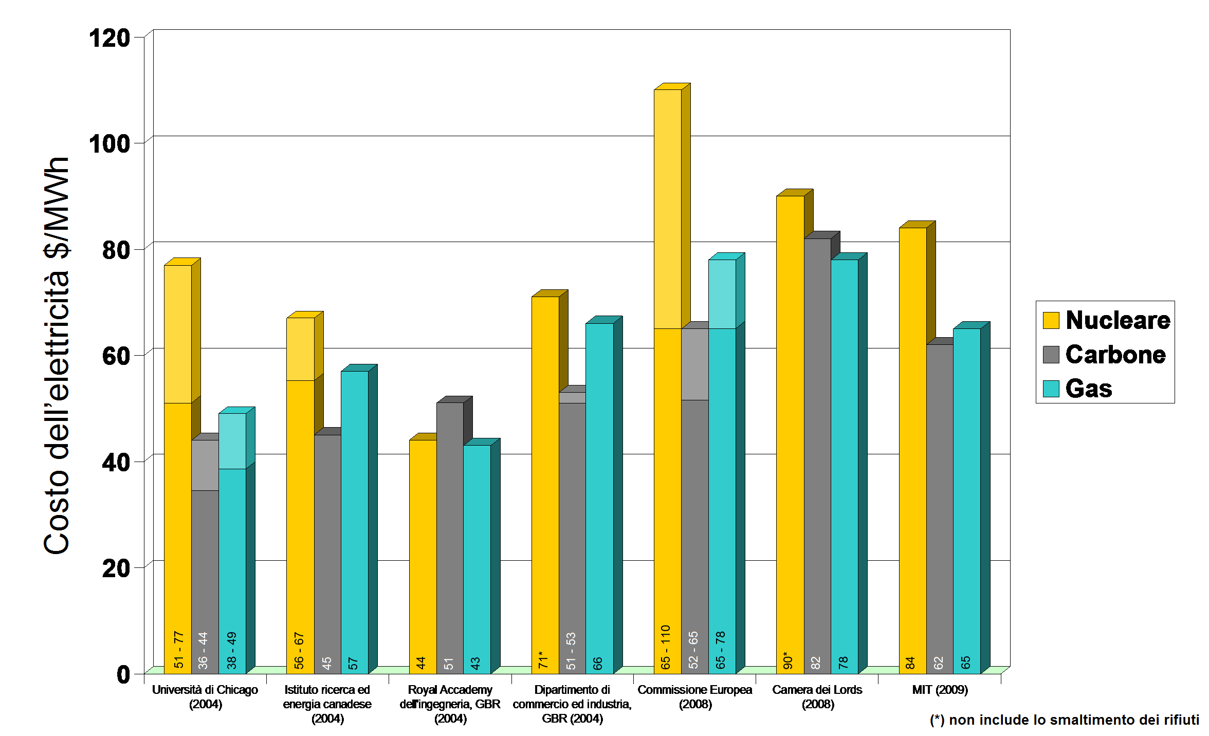 istogramma dei costi di produzione dell'energia elettrica in base al tipo di risorsa usata (materiali fissili, carbone e gas naturale) secondo diversi studi. In alcune barre dell'istogramma è rappresentato un intervallo di costi.